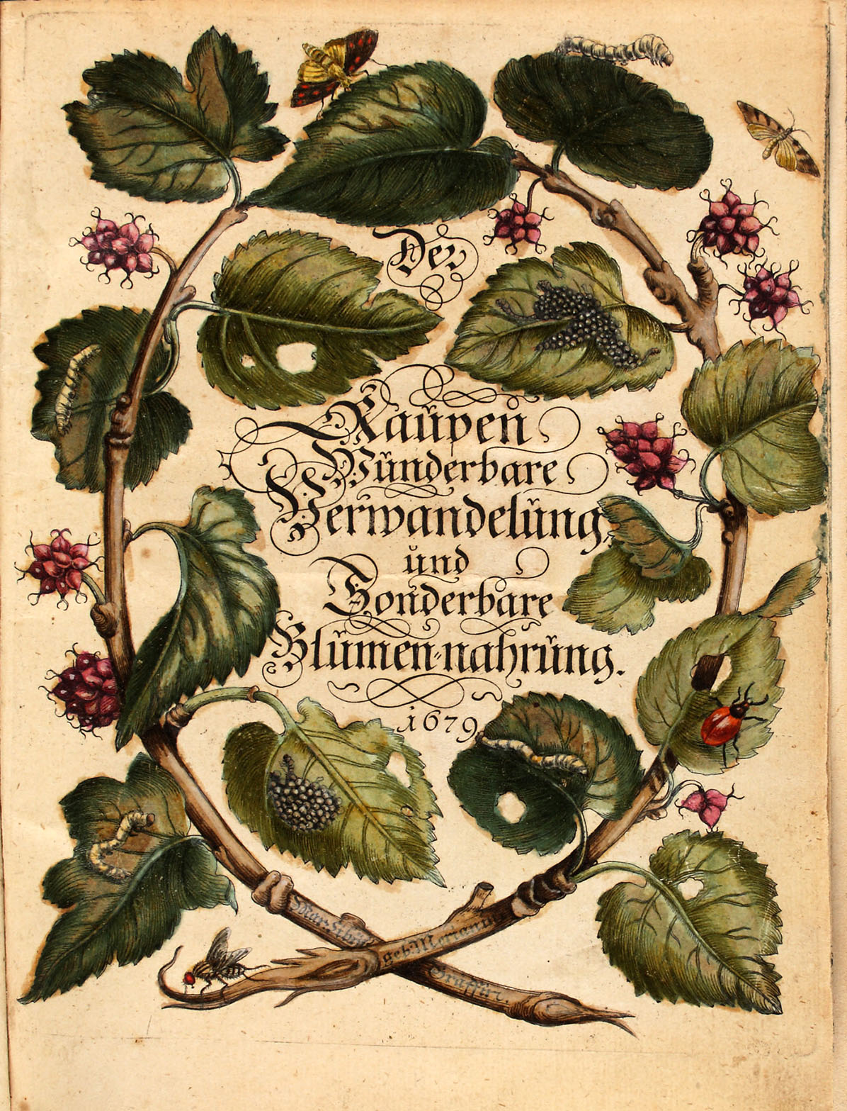 Maria Sibylla Merian: Der Raupen wunderbare Verwandelung und sonderbare Blumennahrung. Bd. 1. Nürnberg 1679. Kolorierter Kupfertitel.